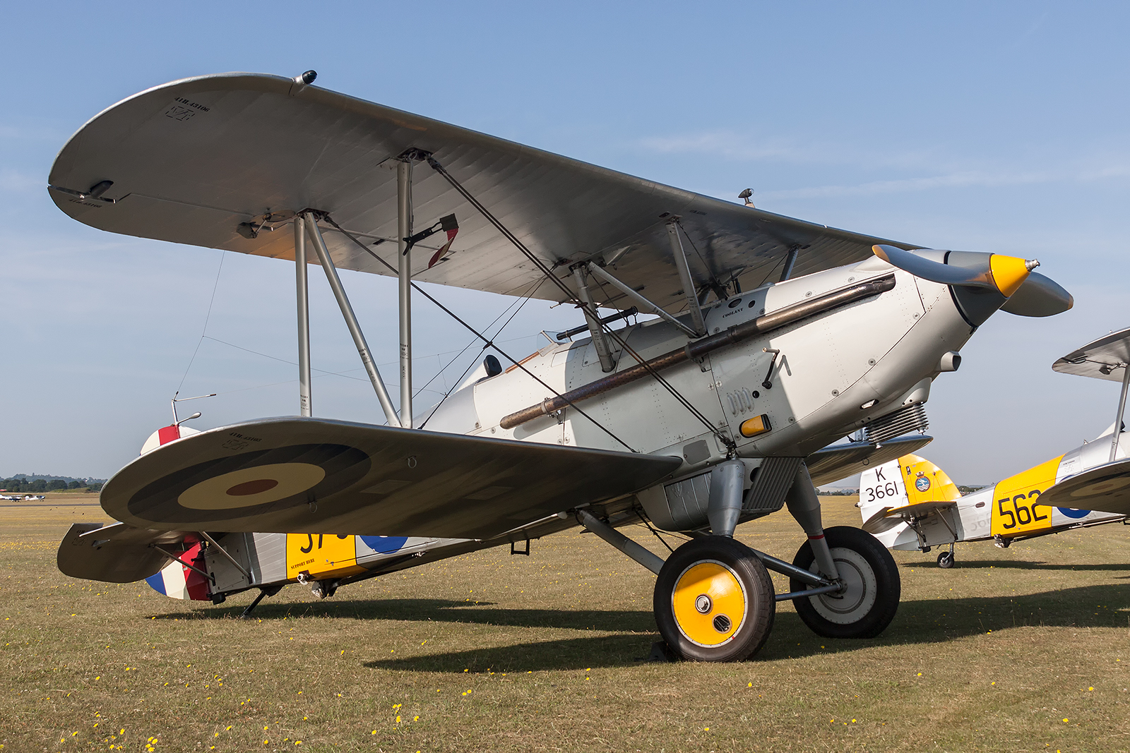 Nimrod MKI durante l'ultimo Flying Legends 2015